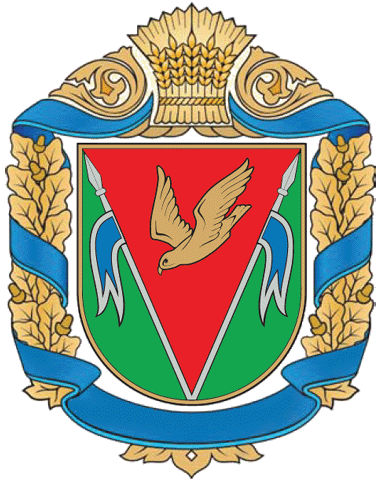 Герб Компаніївського району